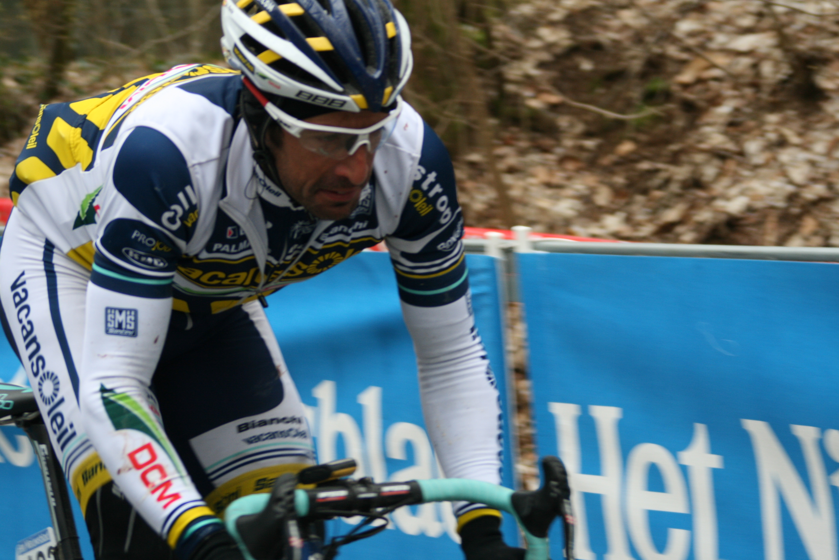 Gent-Wevelgem 2013, Kemmelberg